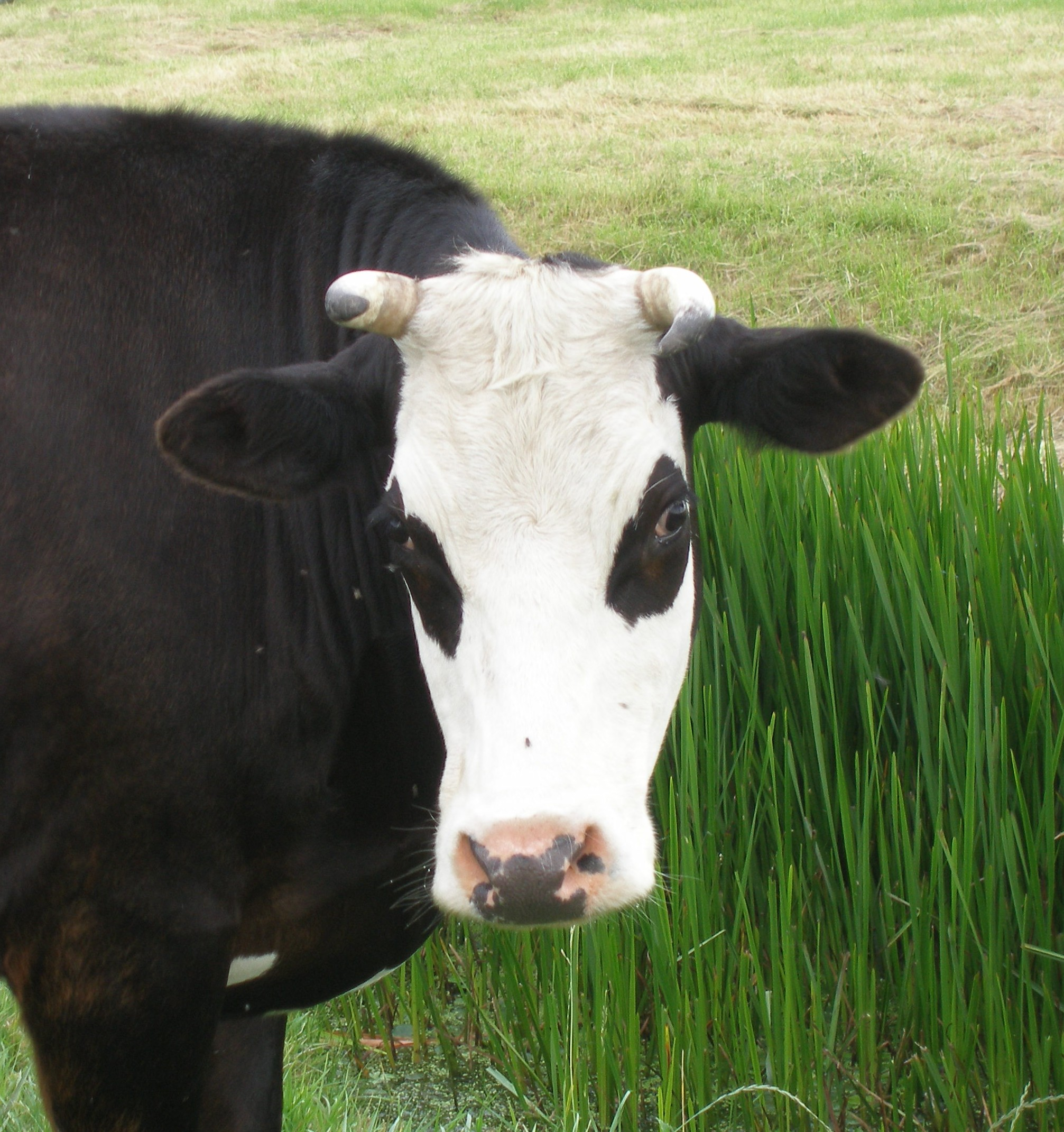 blaarkop